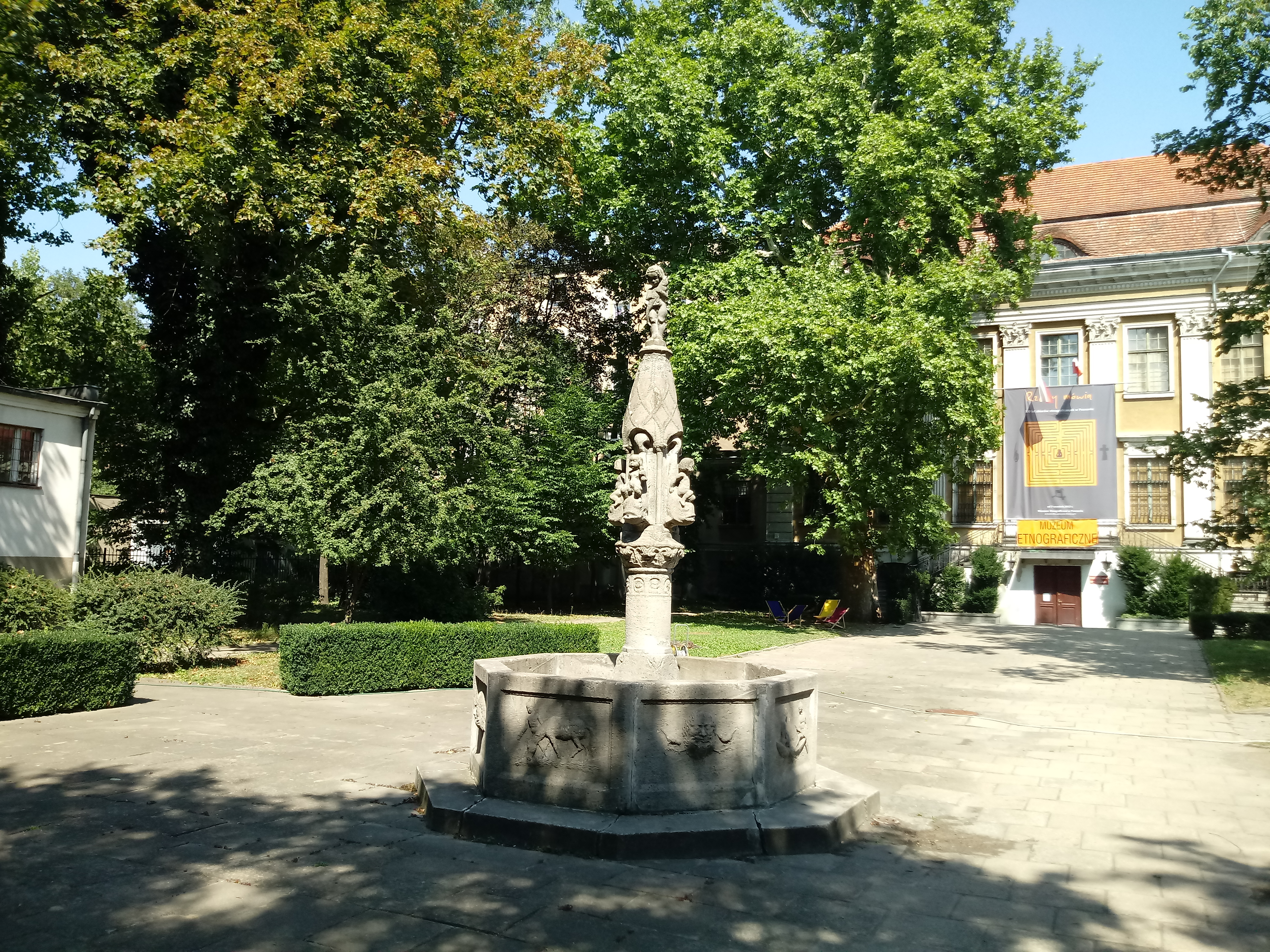 Studzienka Taschnera w Poznaniu, ul. Mostowa